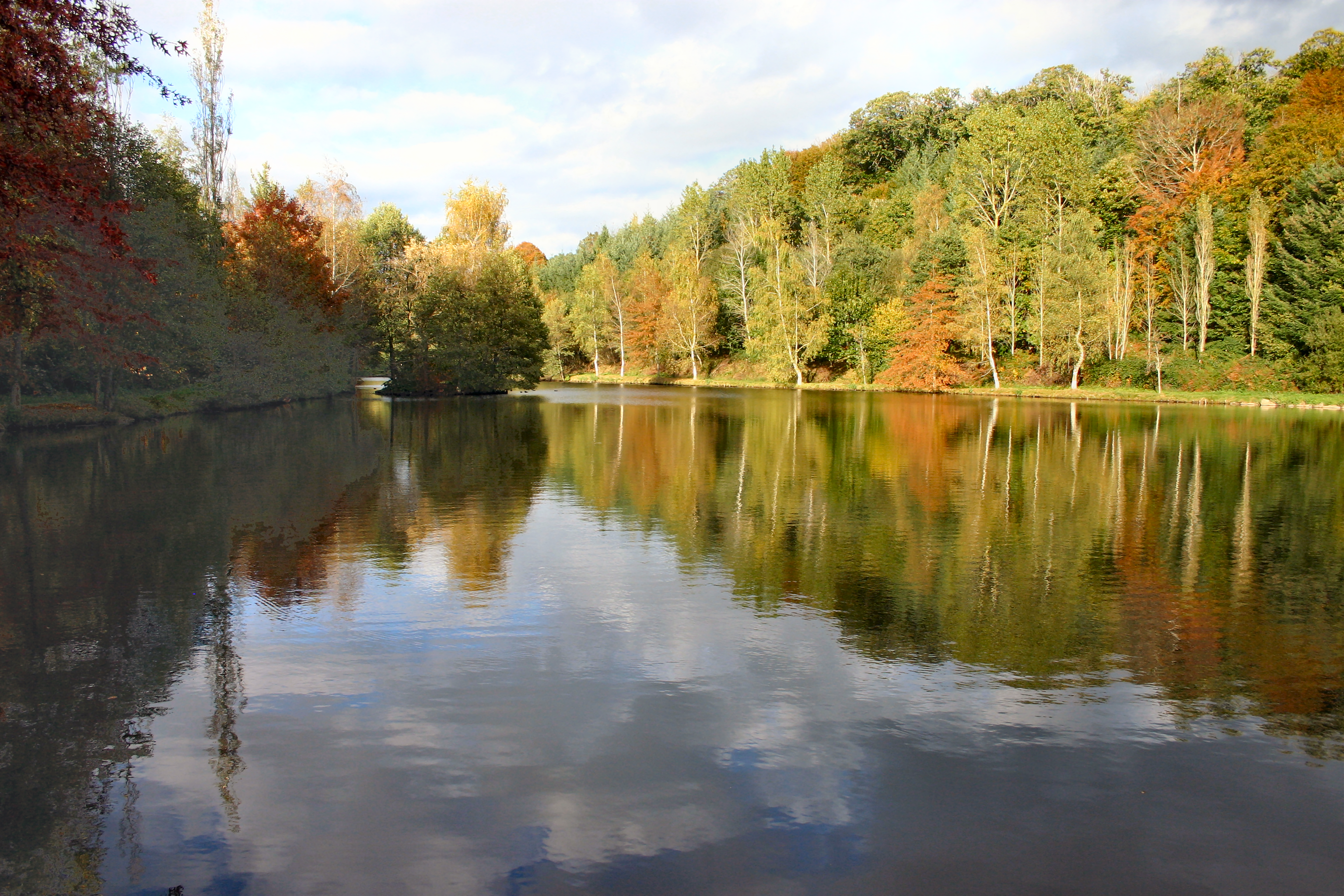 L'étang de Carcenac-Peyralès, en pleine nature, lieu de pêche et de promenade